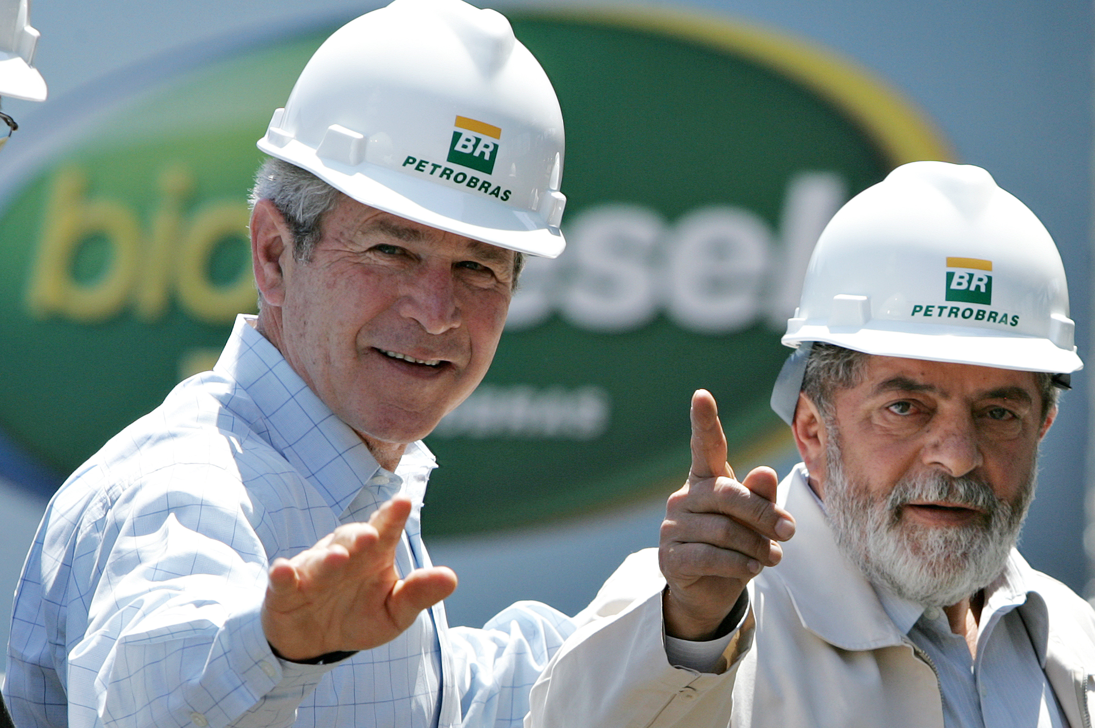 O presidente dos Estados Unidos, George W. Bush, e o presidente do Brasil, Luís Inácio Lula da Silva, durante uma visita à Petrobras.